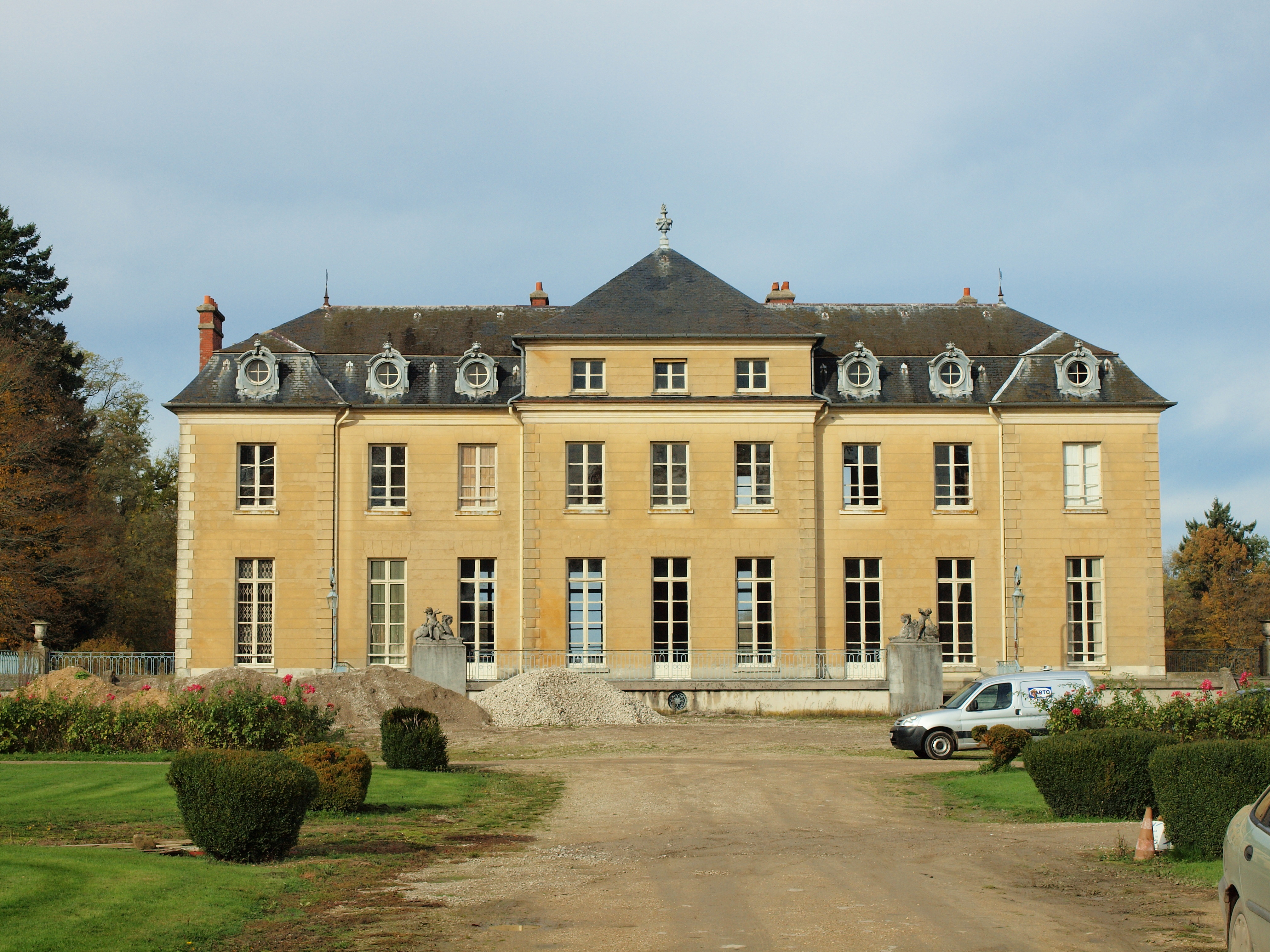 Pierre-Levée (Seine-et-Marne, France)